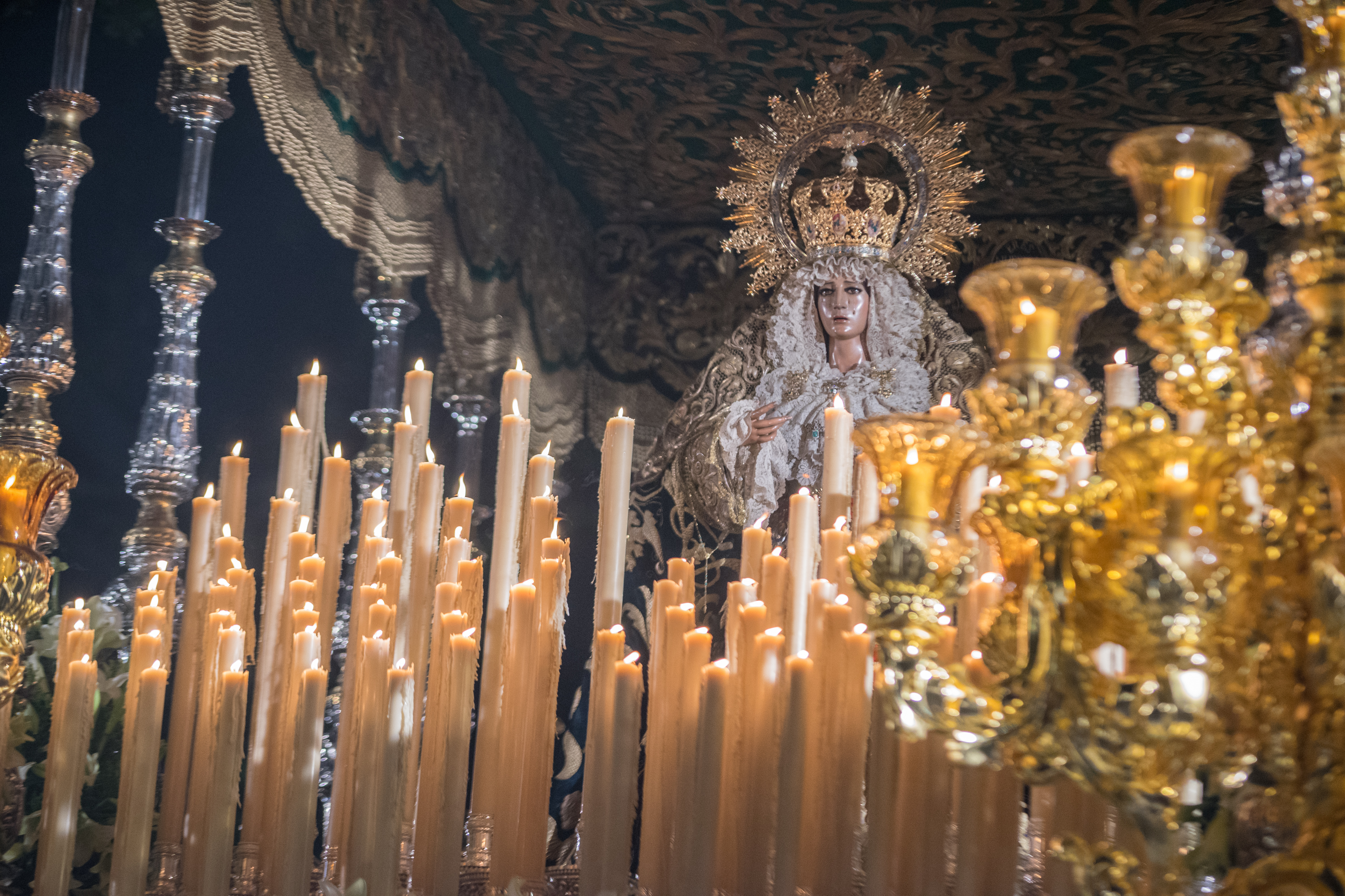 Trono de la Esperanza de la Pontificia y Real Archicofradía del Dulce Nombre de Jesús Nazareno del Paso y María Santísima de la Esperanza This is a photography of a Folklore festival in Spain (Wikidata id Q9075883).